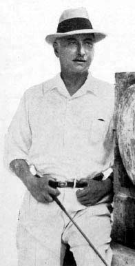 Giulio Antamoro, regista del cinema muto italiano. Immagine del 1926